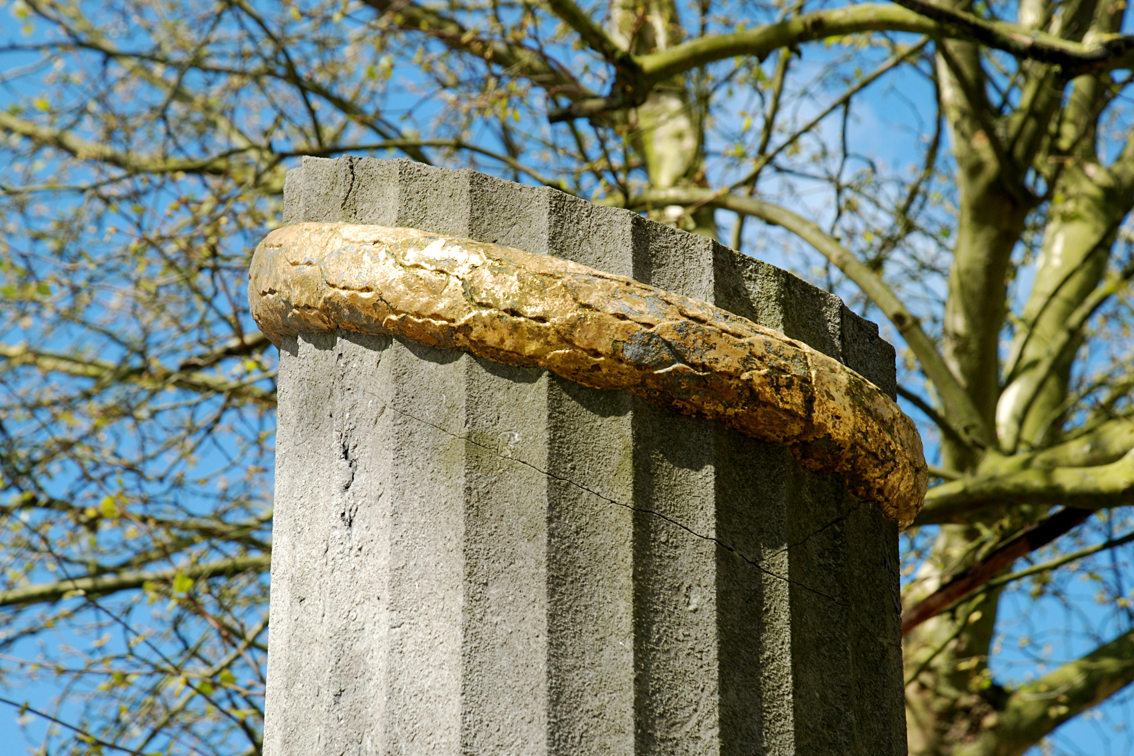 Belgique - Brabant wallon - Nivelles - Colonne aux volontaires de 1830